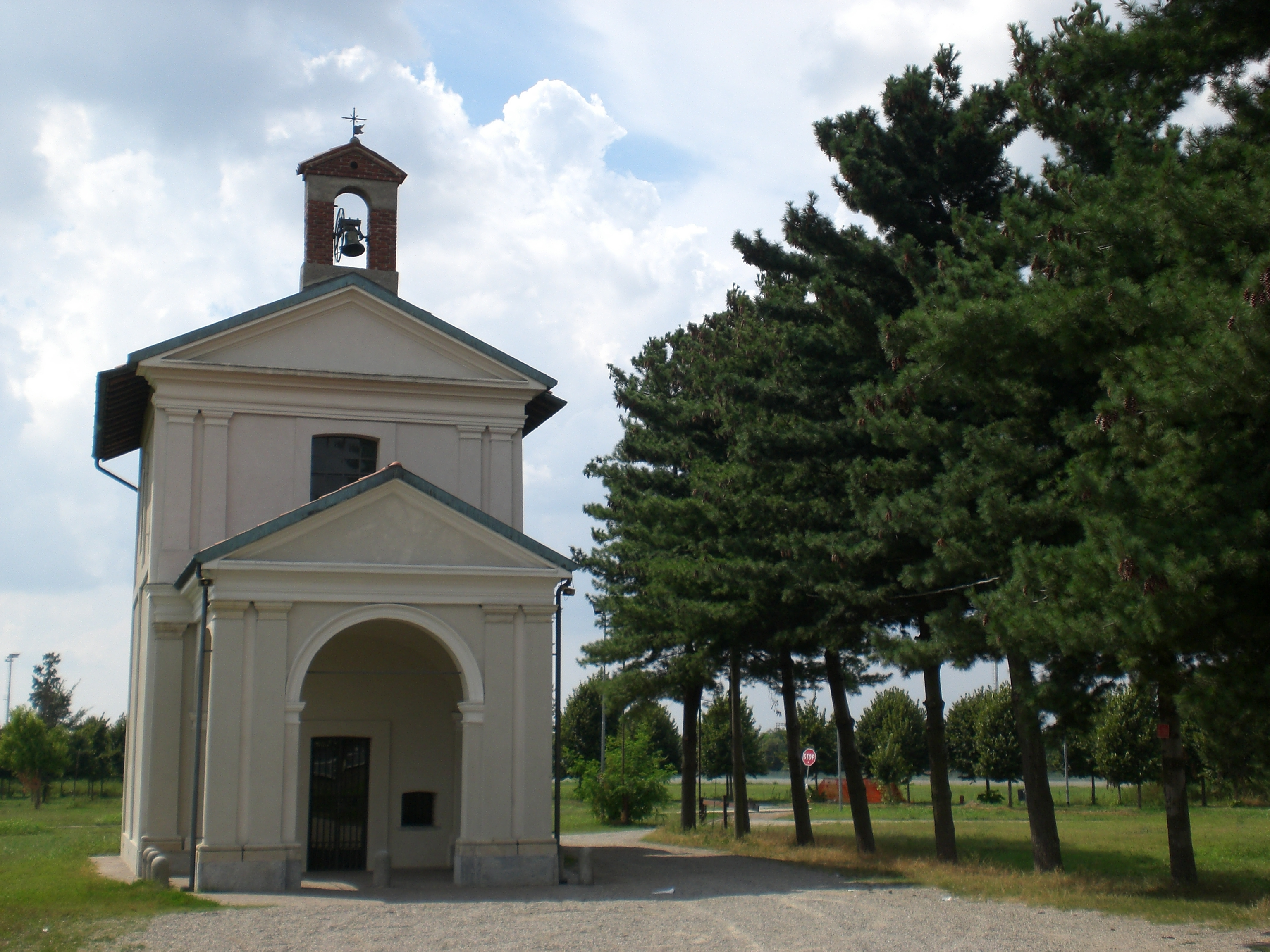 Chiesa di Madonna in Campagna a Sacconago, frazione di Busto Arsizio (VA), a poche decine di metri dalla pista di atletica.